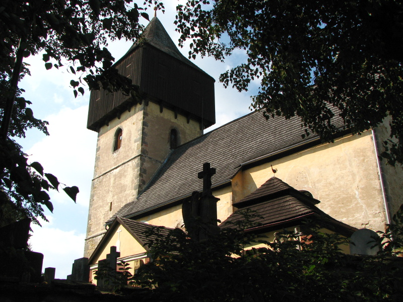 Unknown language: Kostel sv. Zikmunda v Králově Lhotě